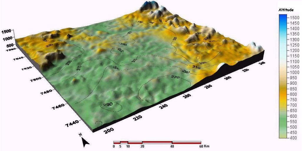 Orografia da porção centro-leste do estado de São Paulo, Brasil Autor: Daniel Candido